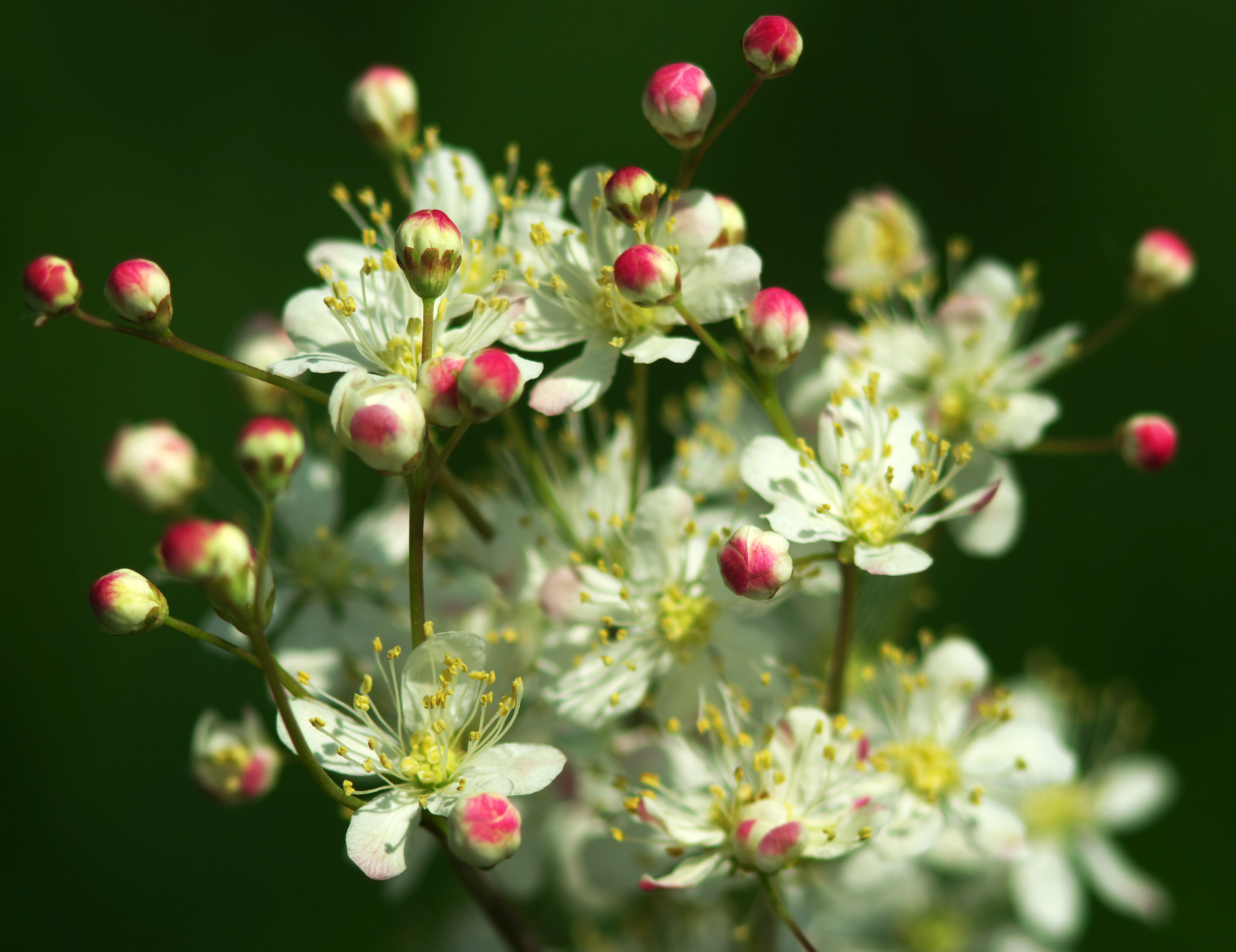 Wiązówka bulwkowa (Filipendula vulgaris) - kwiaty